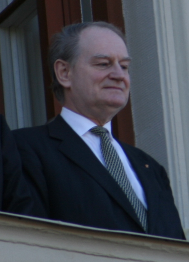 Anders Björck i Uppsala på Valborg 2009